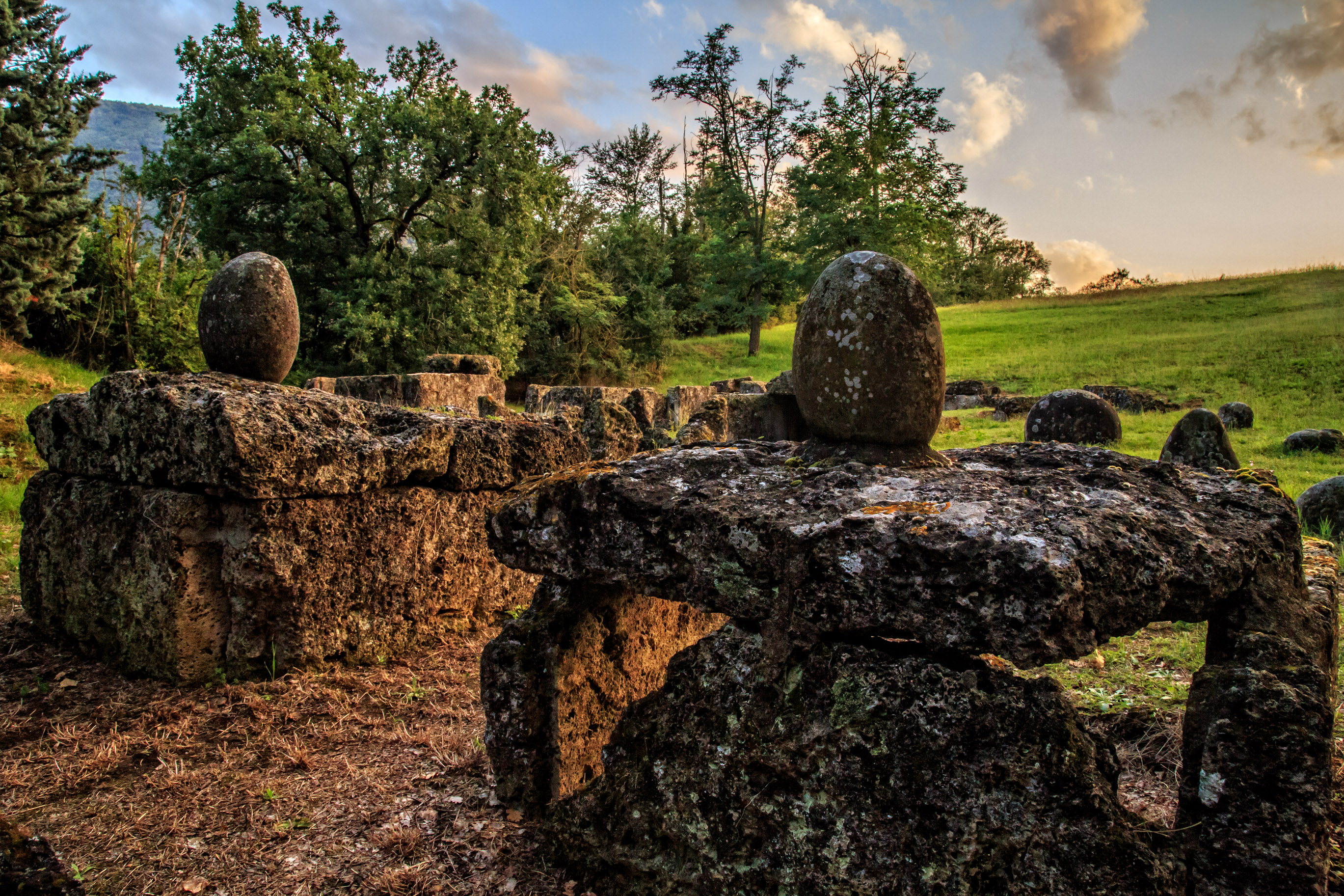 Area archeologica di Marzabotto/Kainua This is a photo of a monument which is part of cultural heritage of Italy.